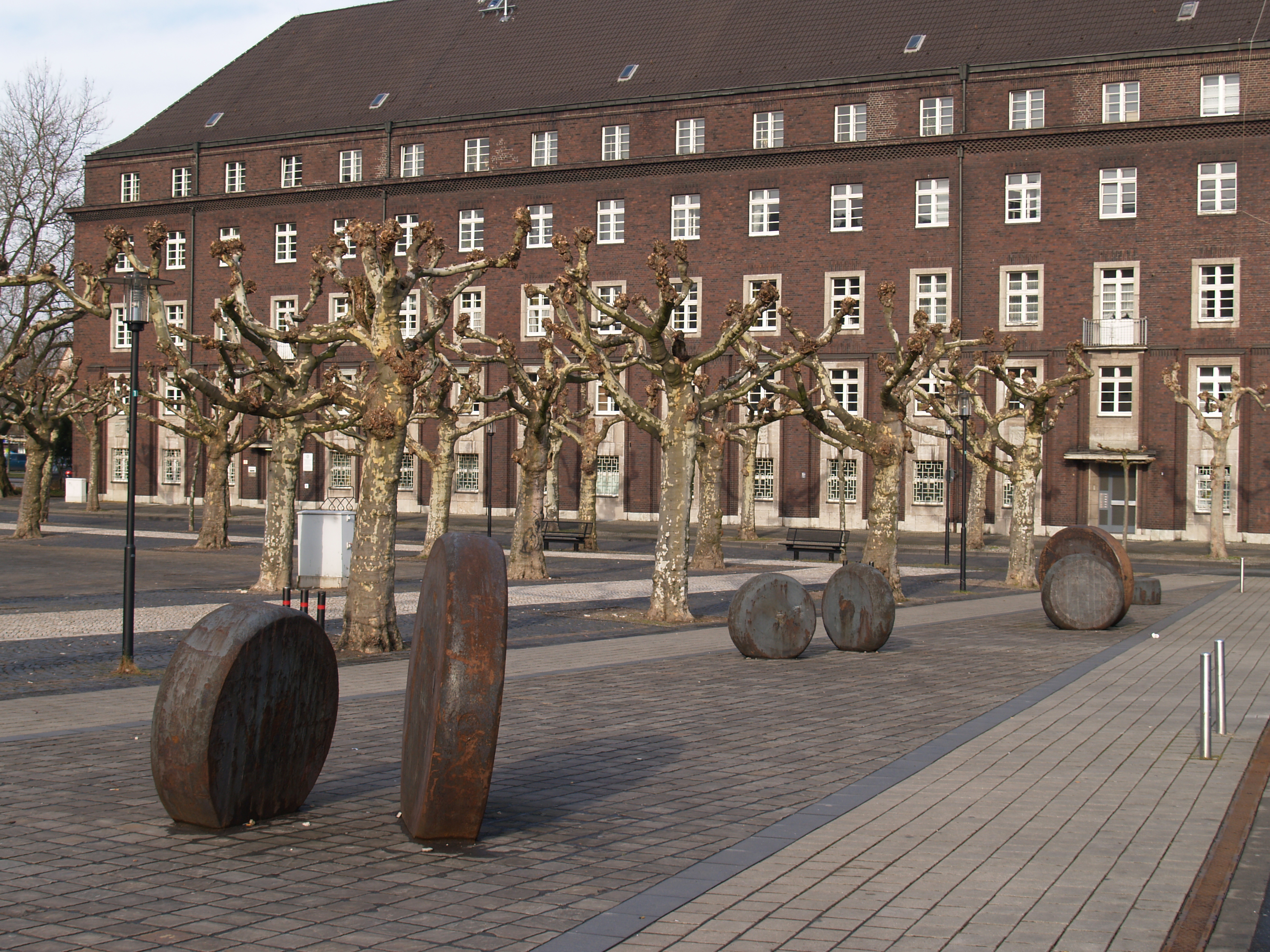 Herner Ronden, sieben Skulpturen, runde dicke Scheiben aus Cortenstahl von Heinz-Günter Prager (2004) auf dem Friedrich-Ebert-Platz in Herne vor dem städtischen Verwaltungsgebäude.